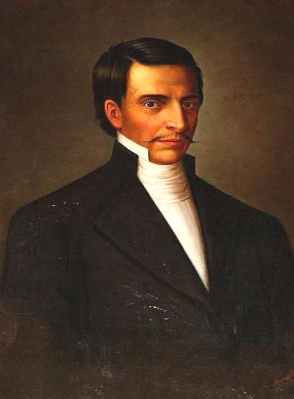 Eugenio de Santa Cruz y Espejo, precursor de la Independencia latinoamericana.